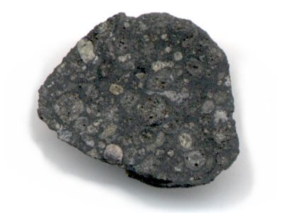 Ein Bild eines Meteoriden